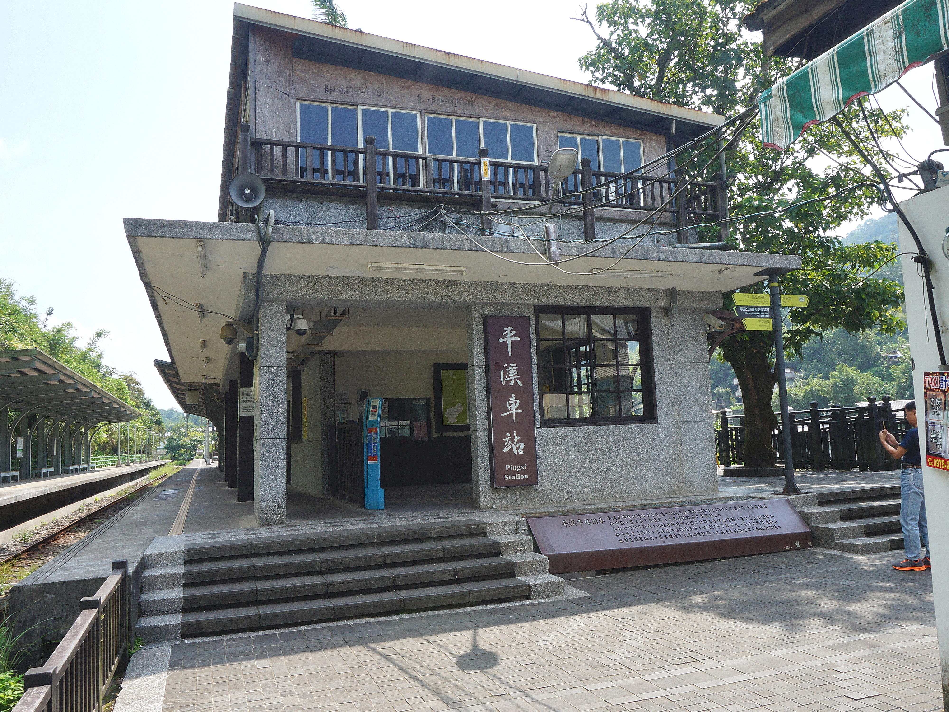 臺灣鐵路管理局平溪車站中華街側。